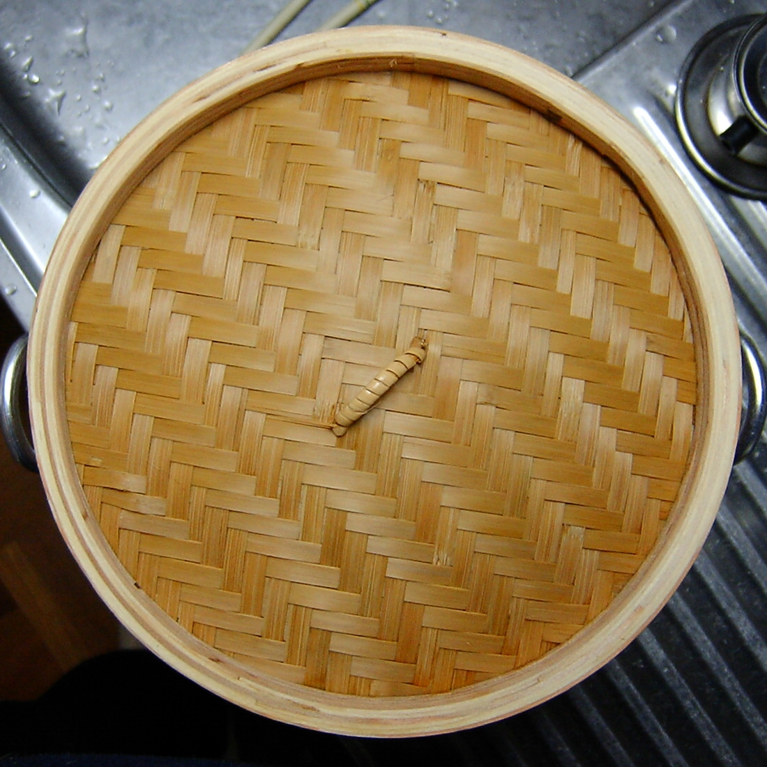 Bambuskorb zum Dämpfen auf einem Asiakocher oder Chinakocher für Dim Sun Gerichte